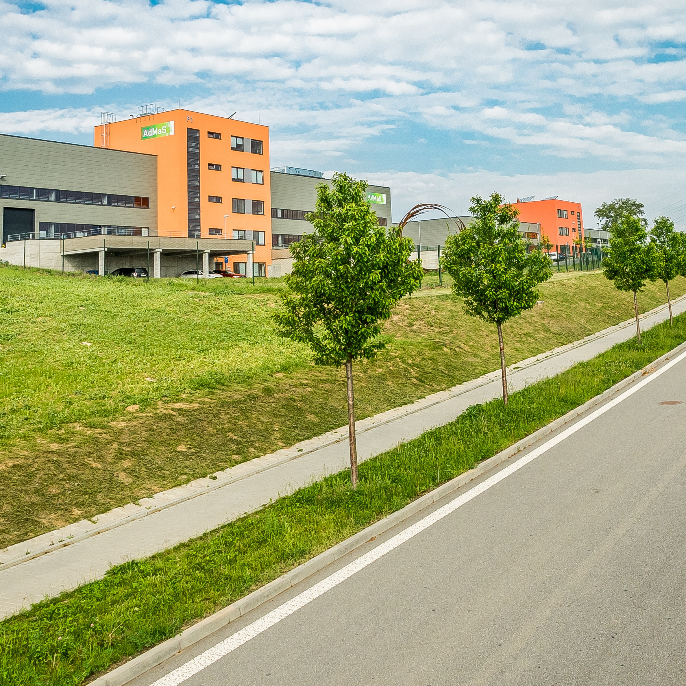 Budovy centra AdMaS